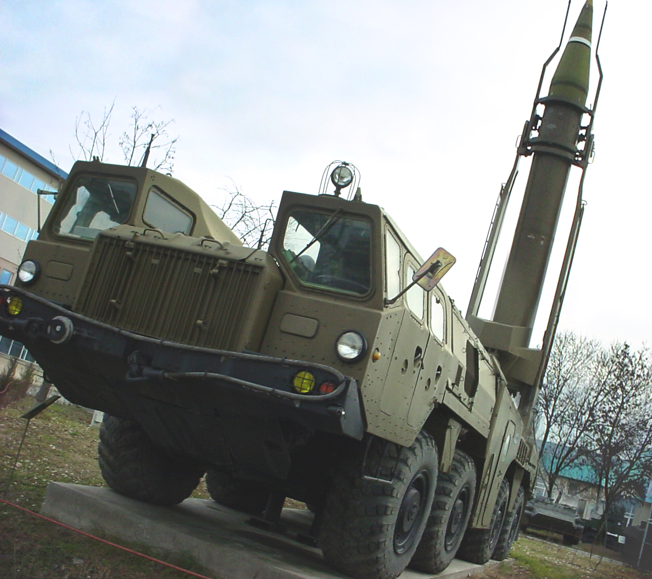 Foto tomada por mi en Bulgaria, en la fotografía se ve el Misil Скад sobre un transporte МАЗ-543П